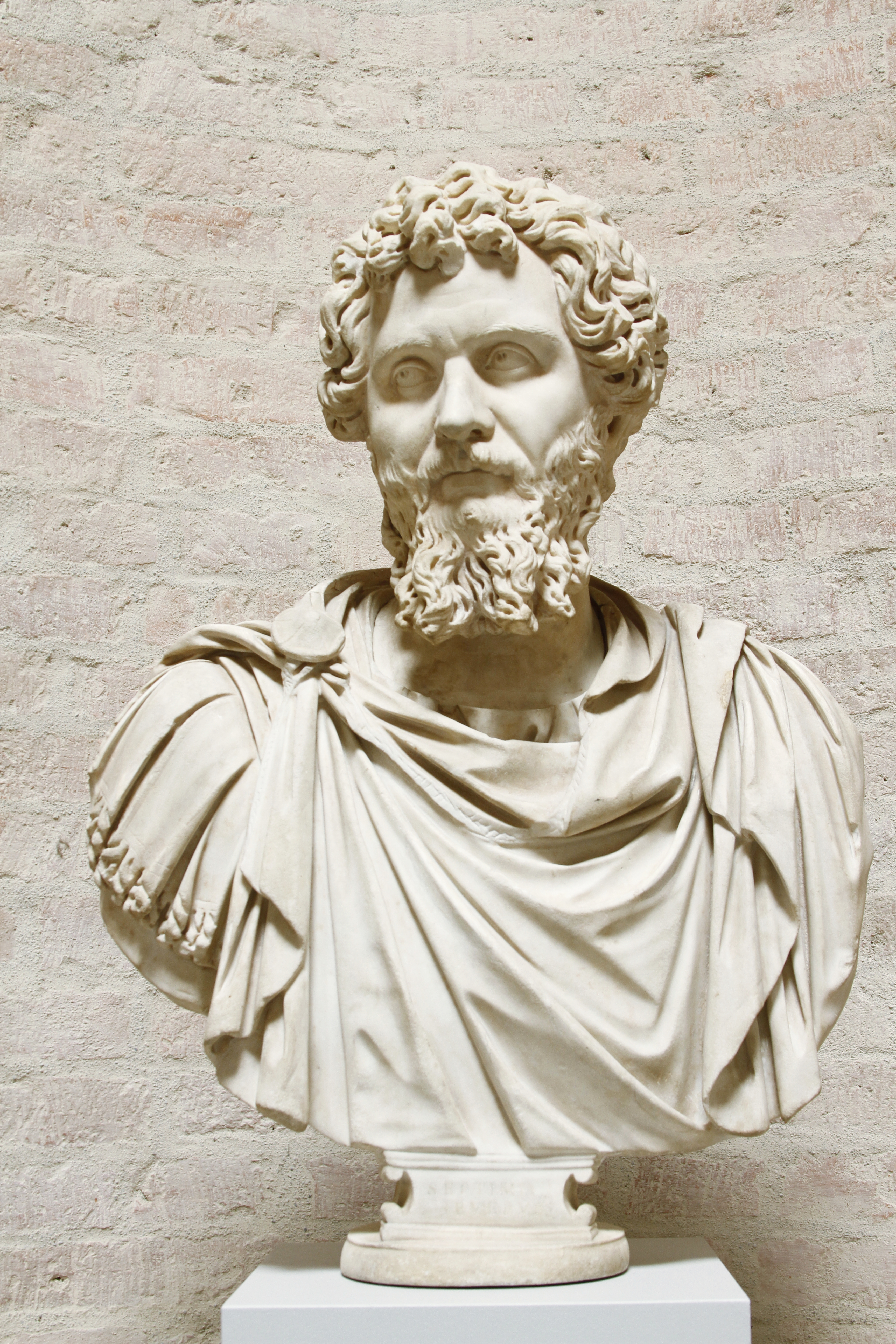 Glyptothek - Munich - Germany